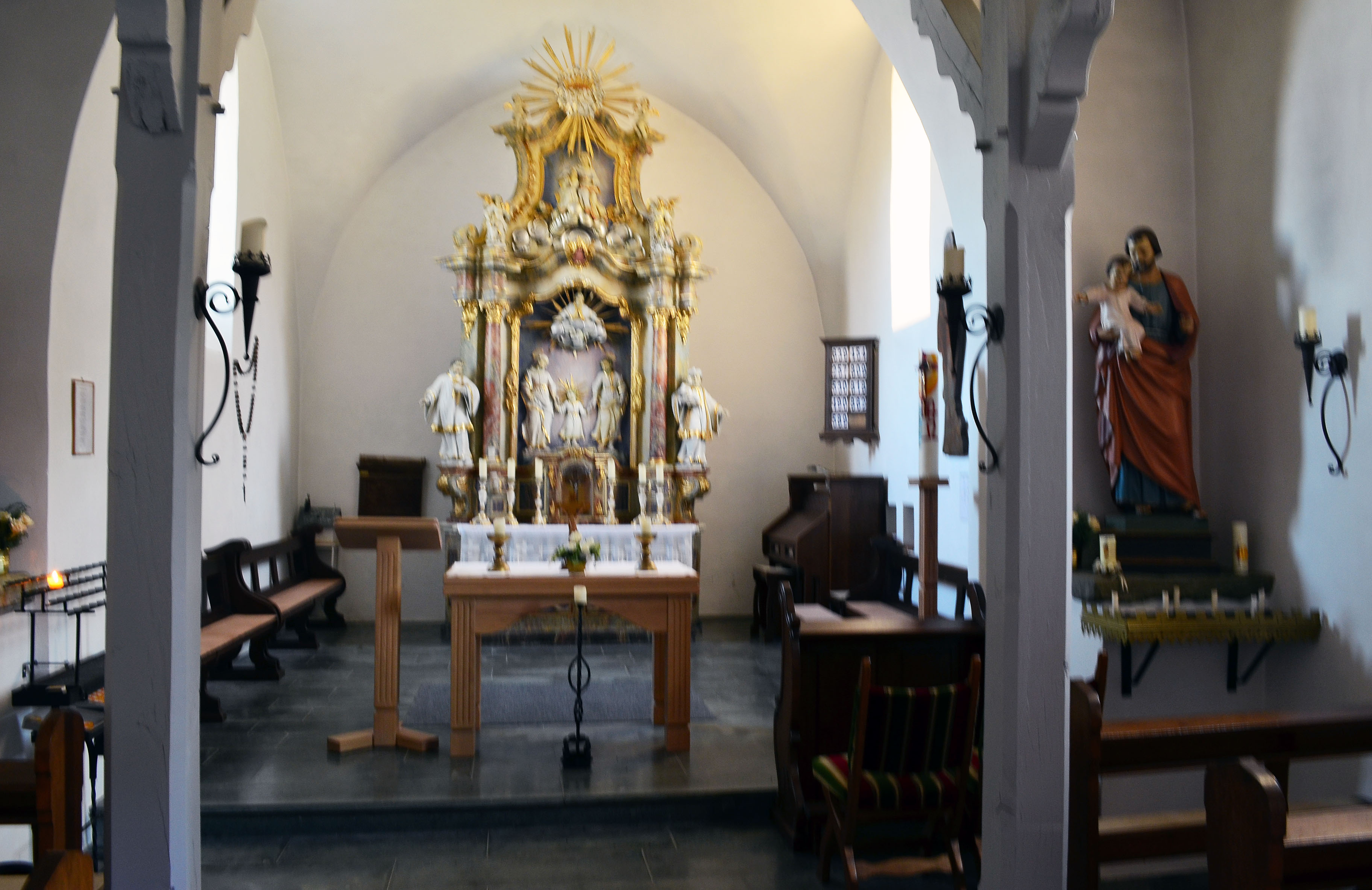 Brilon, Keffelker Kapelle, Blick durch die Kapelle auf den Altar